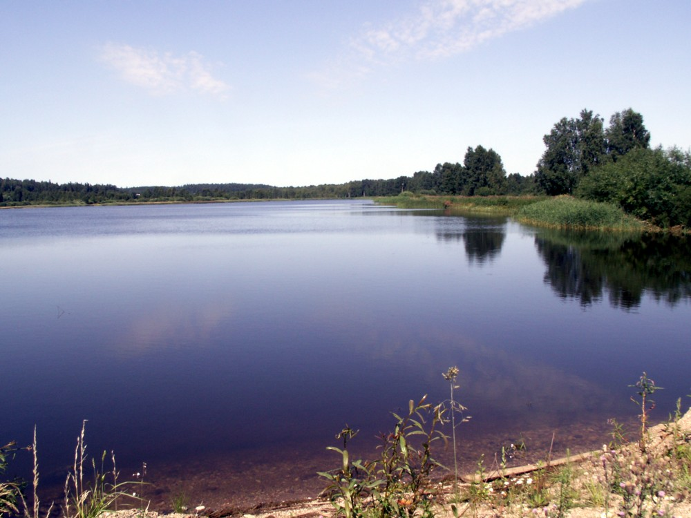 Kurtuvėnai – miestelis Šiaulių rajono pietvakariuose